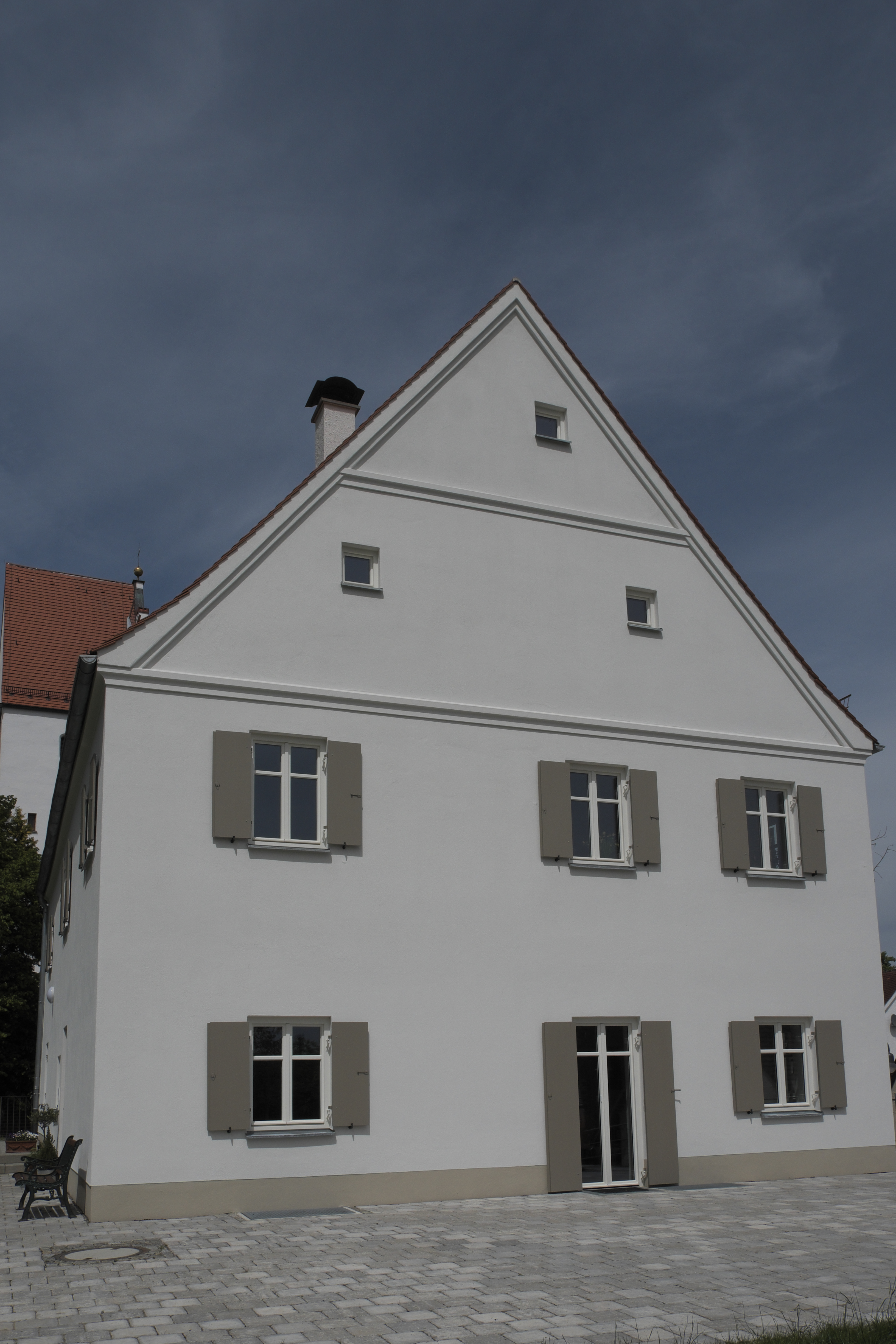 Pfarrhaus neben der katholischen Pfarrkirche St. Stephanus in Hainhofen, einem Stadtteil von Neusäß im Landkreis Augsburg (Bayern)